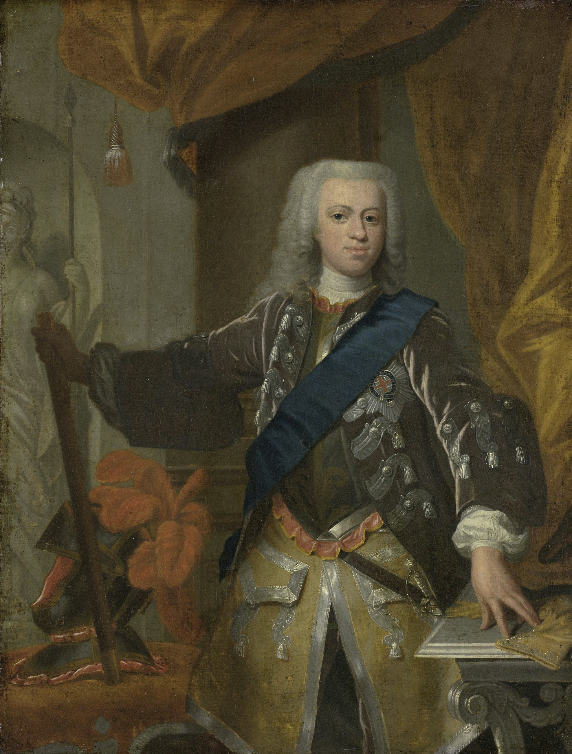 Portret van Willem IV, prins van Oranje. Kniestuk, staande met de linkerhand op een tafeltje en commadostaf in de rechterhand. De staf geleund op een stoel waarop ook zijn gepluimde helm staat. Links op de achtergrond een beeld van een vrouwelijke krijger of godin met een lans.